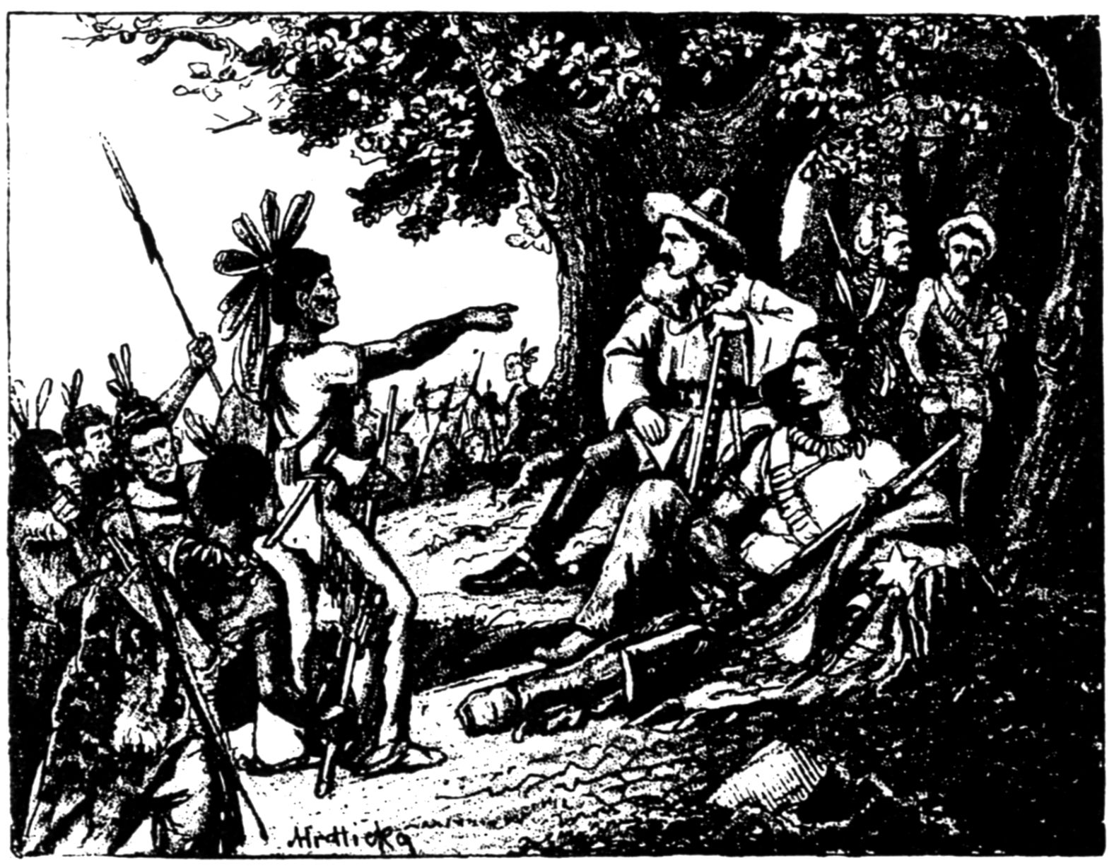 Hier sitzt Winnetou der Häuptling der Apatschen, es ist Friede!, Illustration (5) von A. Hrdlicka zur Erzählung Mutterliebe von Karl May, veröffentlicht im Einsiedler Marien-Kalender 1899. Einsiedeln, St. Ludwig (1898)